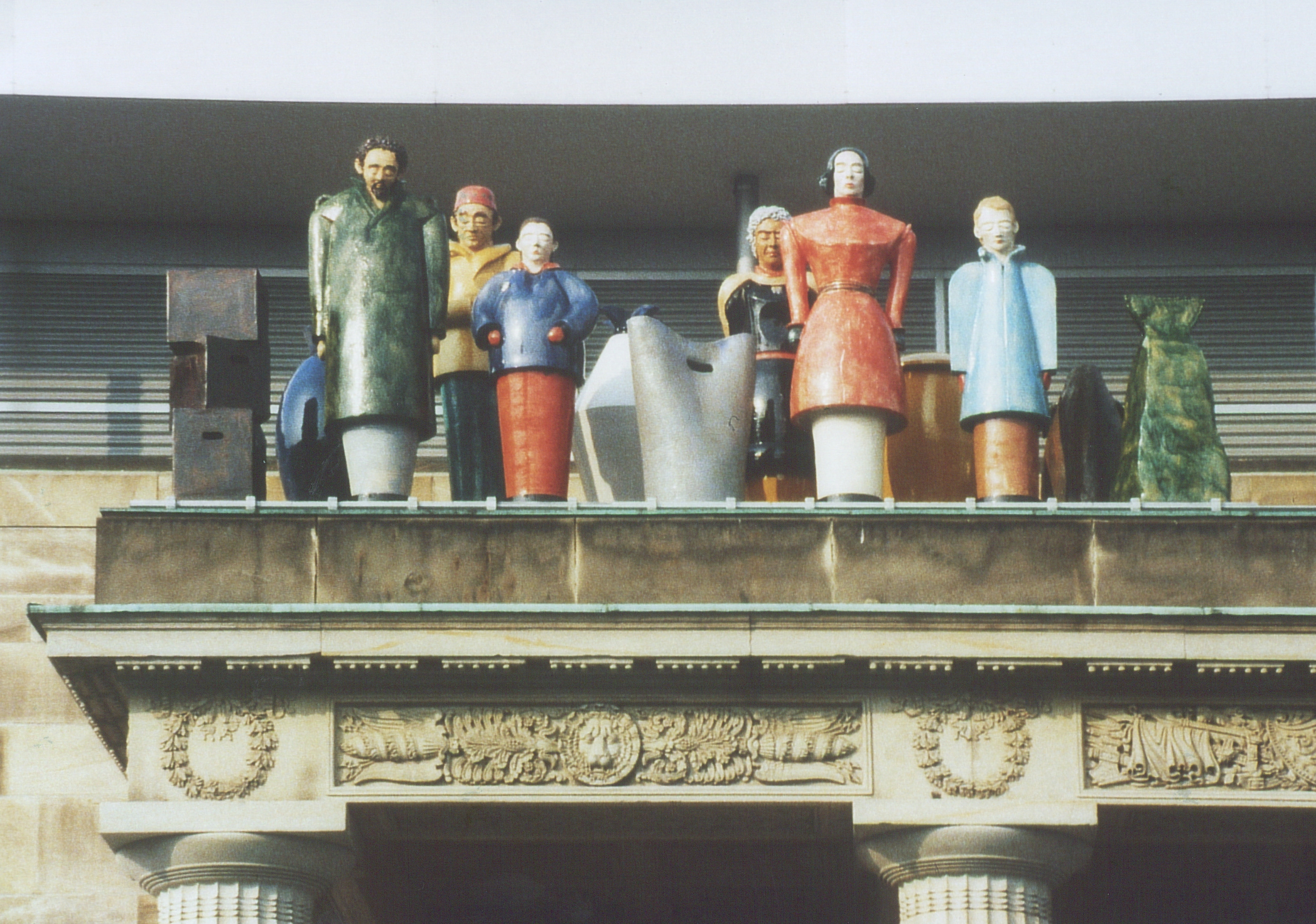 documenta IX: "Die Ankunft der Fremden", von Thomas Schütte, auf dem Portikus des ehemaligen Roten Palais in Kassel, 1992